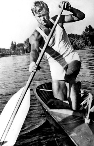 Andrei Igorov